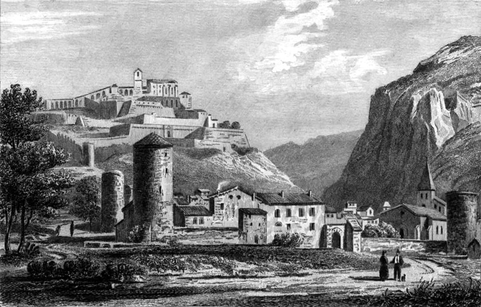 Image en provenance du livre : Eusèbe Girault de Saint-Fargeau, Guide pittoresque du voyageur en France, contenant la statistique et la description complète des quatre-vingt-six départements, orné de 740 vignettes et portraits gravés sur acier, de quatre-vingt-six cartes de départements et d'une grande carte routière de la France, par une Société de gens de lettres, de géographes et d'artistes, Paris, F. Didot frères, 1838, 6 volumes in-8° (BNF : 8-L25- 46). Volume III Didot frères, 1838. Route de Paris à Nice traversant les départements de l'Isère, des Hautes-Alpes, des Basses-Alpes et du Var. auteurs dessins : Rauch (ou autre) auteurs gravures : Skelton fils, Schroeder, Bishop (ou autre)